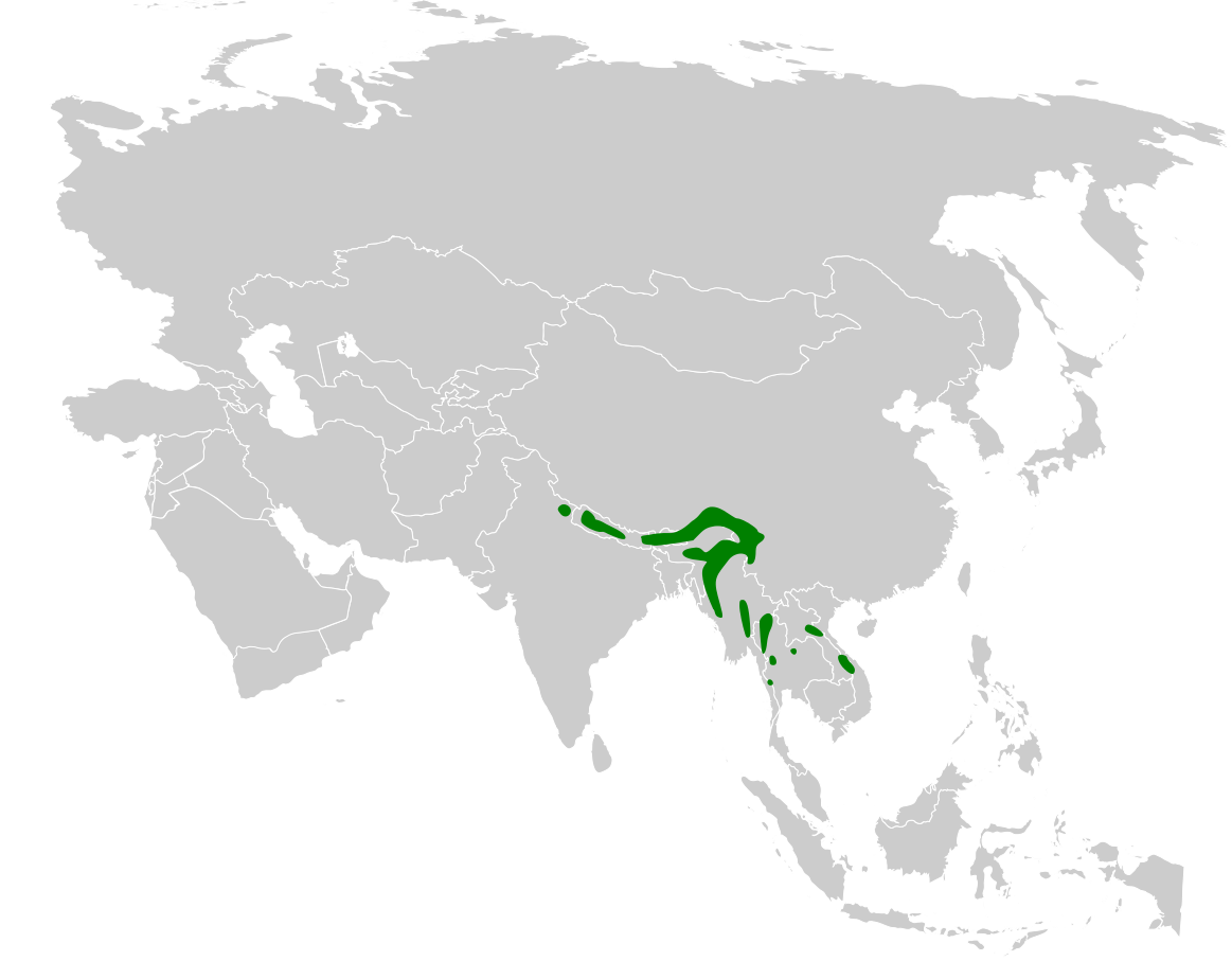 Suthora nipalensis distribution map